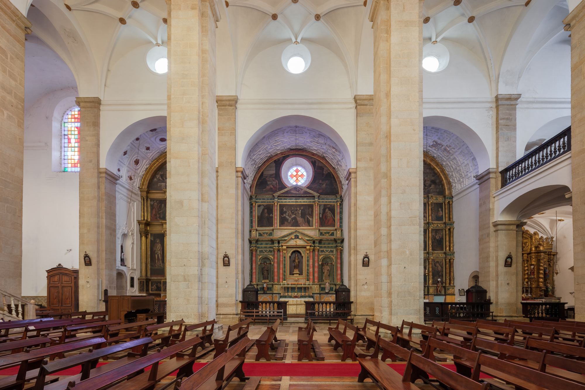 Retábulo composto encimados por um arco com óculo central e cercado por uma pintura; tem dois níveis horizontais, o superior com três pinturas, separadas por colunas marmoreadas e com capitéis coríntios, sendo a pintura central maior e rematada com frontão; o nível inferior é formado por três nichos onde se encontram colocadas as esculturas. Também estes são separados por colunas semelhantes às superiores. Na base destas colunas tem ornamentos em talha dourada.